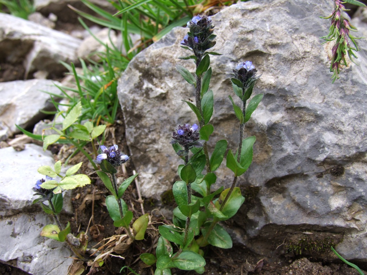 Veronica alpina (habitat: Tatry)